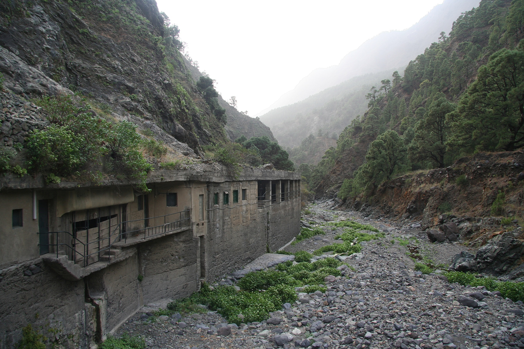 Im Barranco de Las Angustias (La Palma)